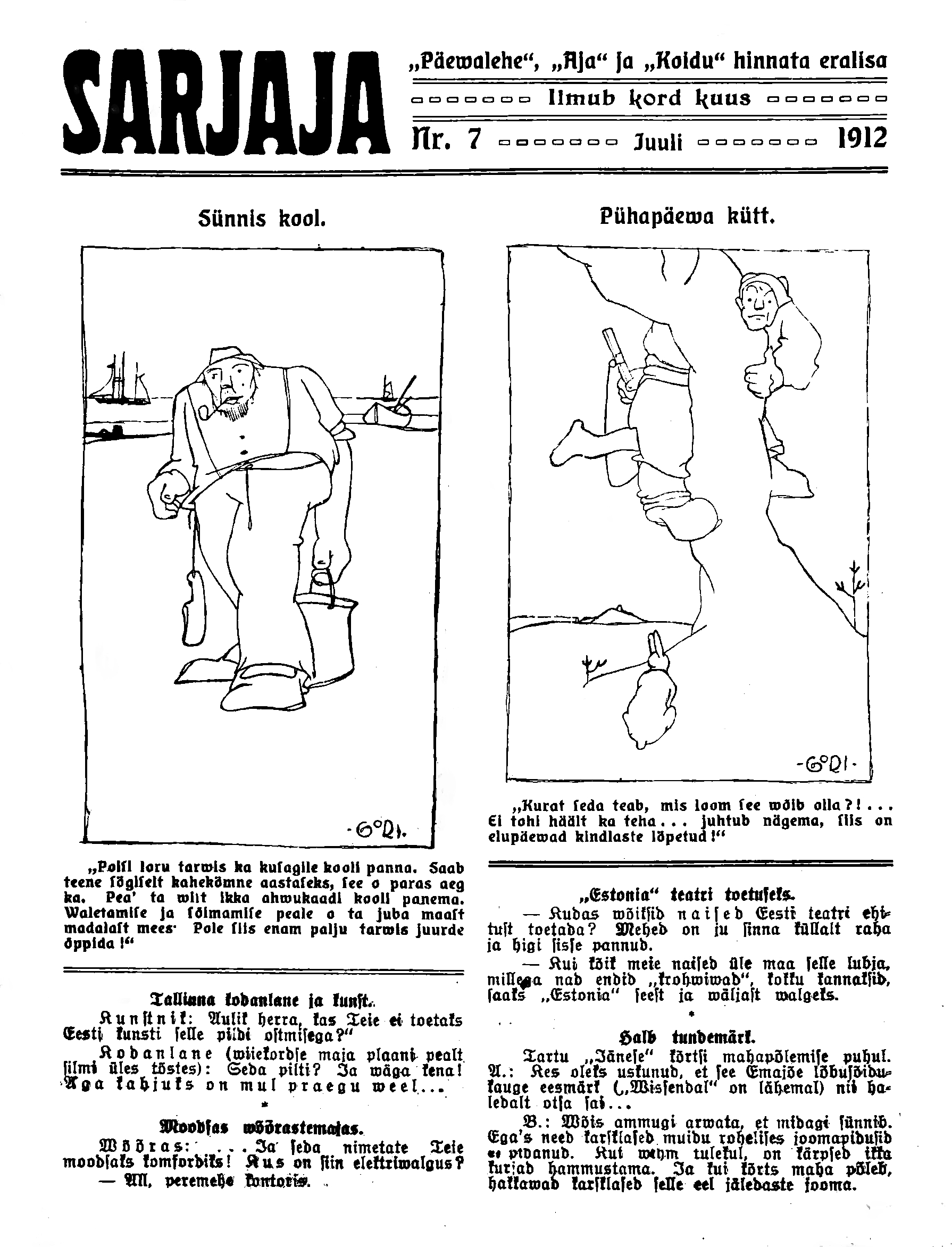 Ajakirja Sarjaja esikaas